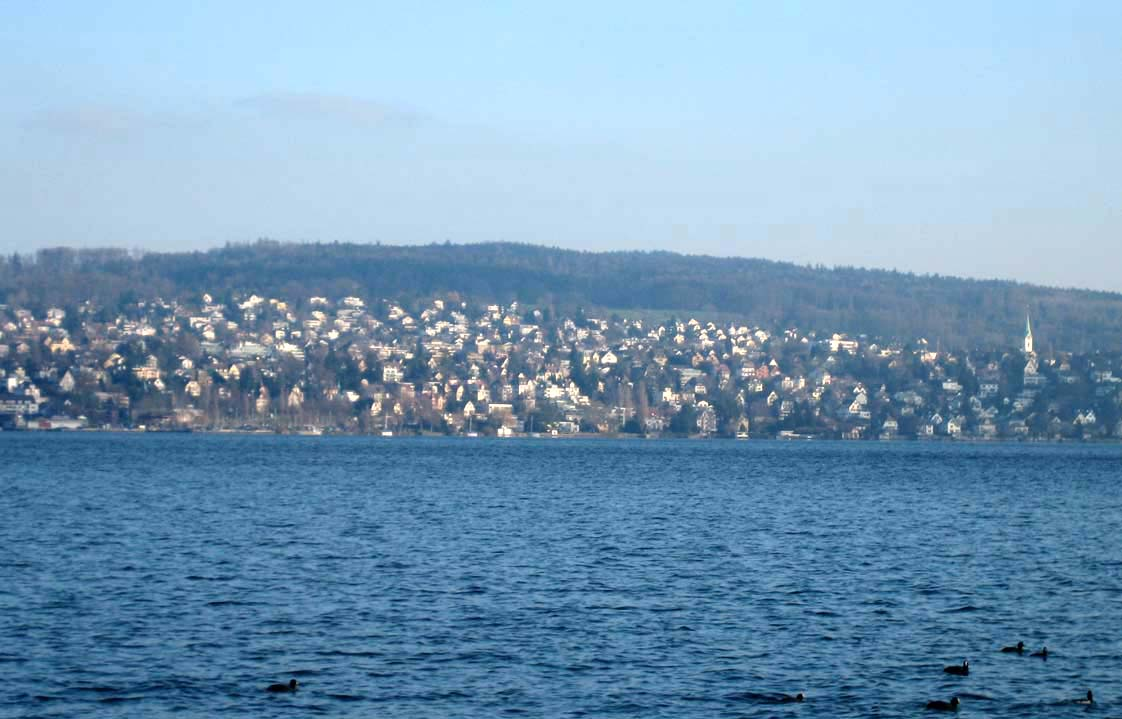 Zollikon, von Wollishofen aus gesehen